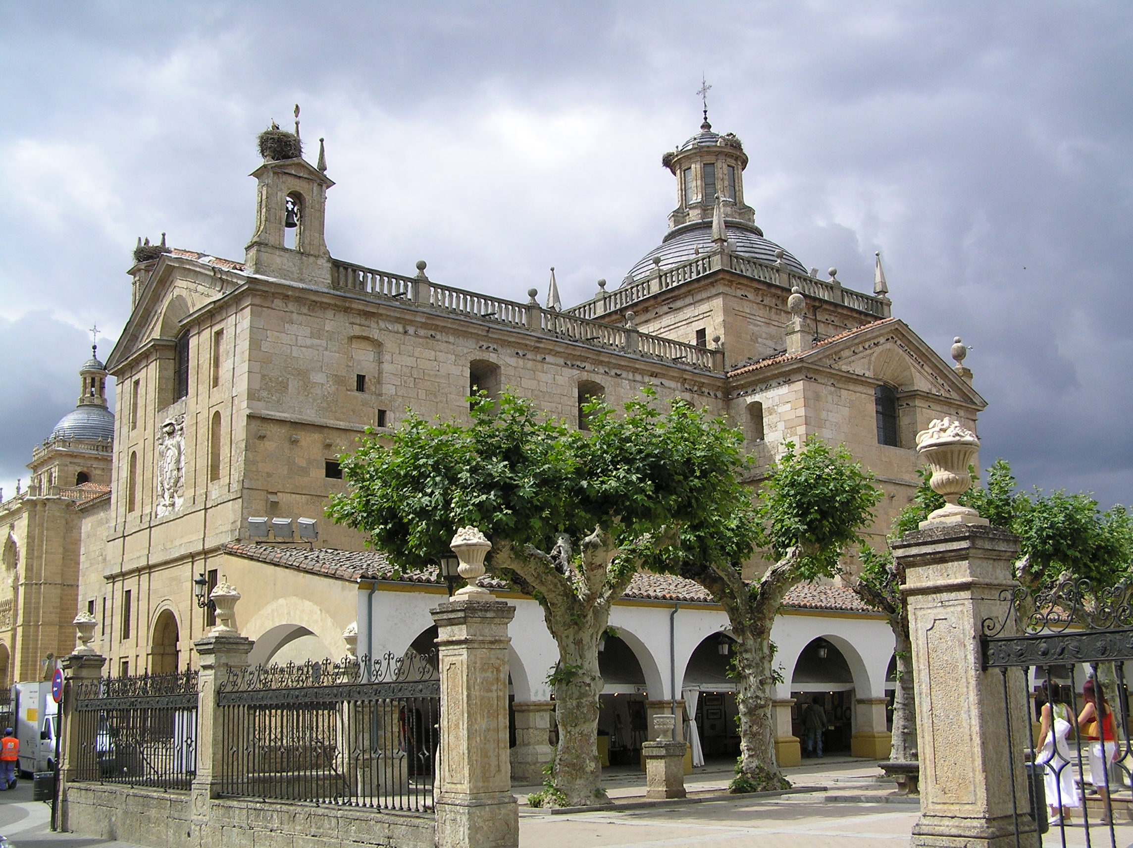 Vista de la Capilla de Cerralbo desde la Plaza del Buen Alcalde. Ciudad Rodrigo (provincia de Salamanca, España)